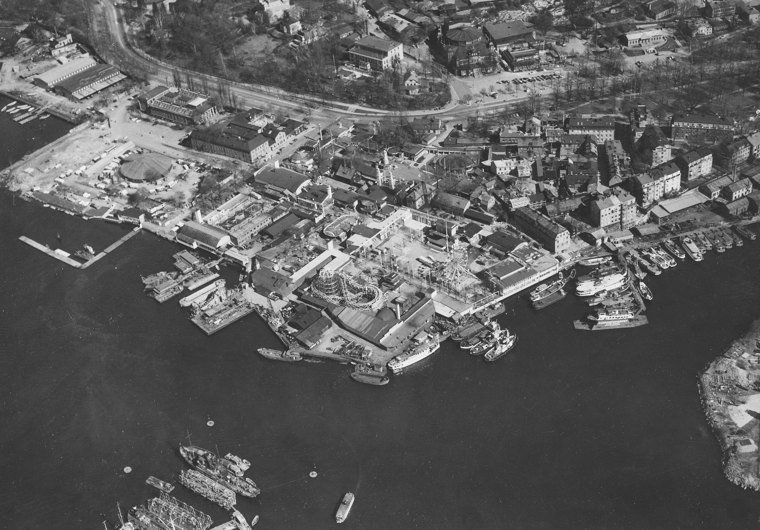 Djurgårdssaden och Gröna Lund, i förgrunden pågår bärgningen av Vasa